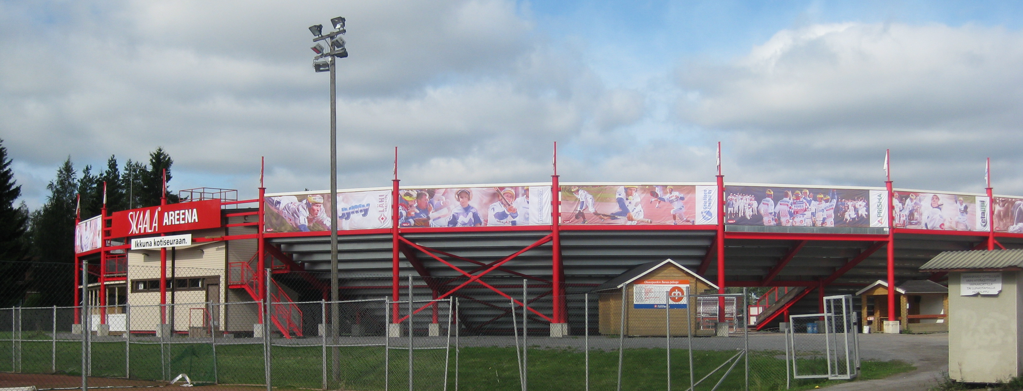 Skaala-areena